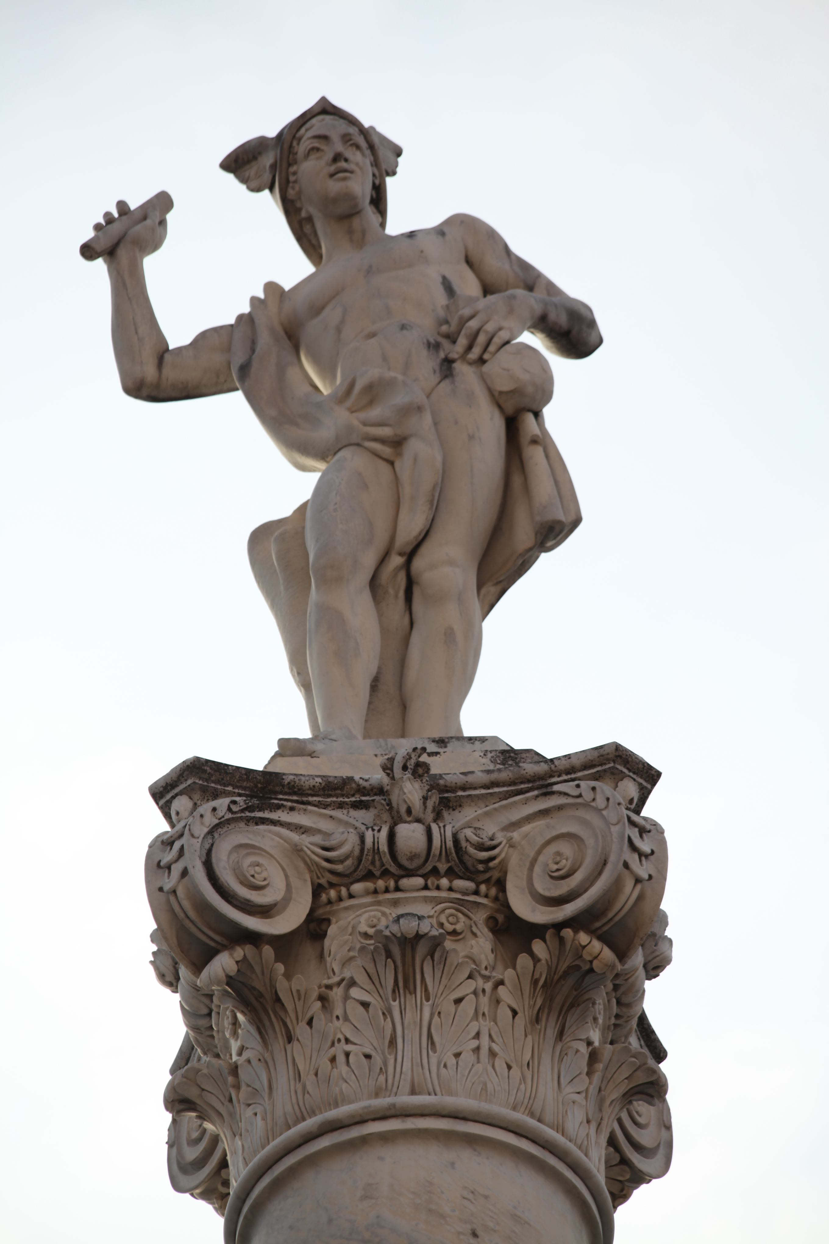 Statua di Hermes, Piazza Mercurio (Massa)